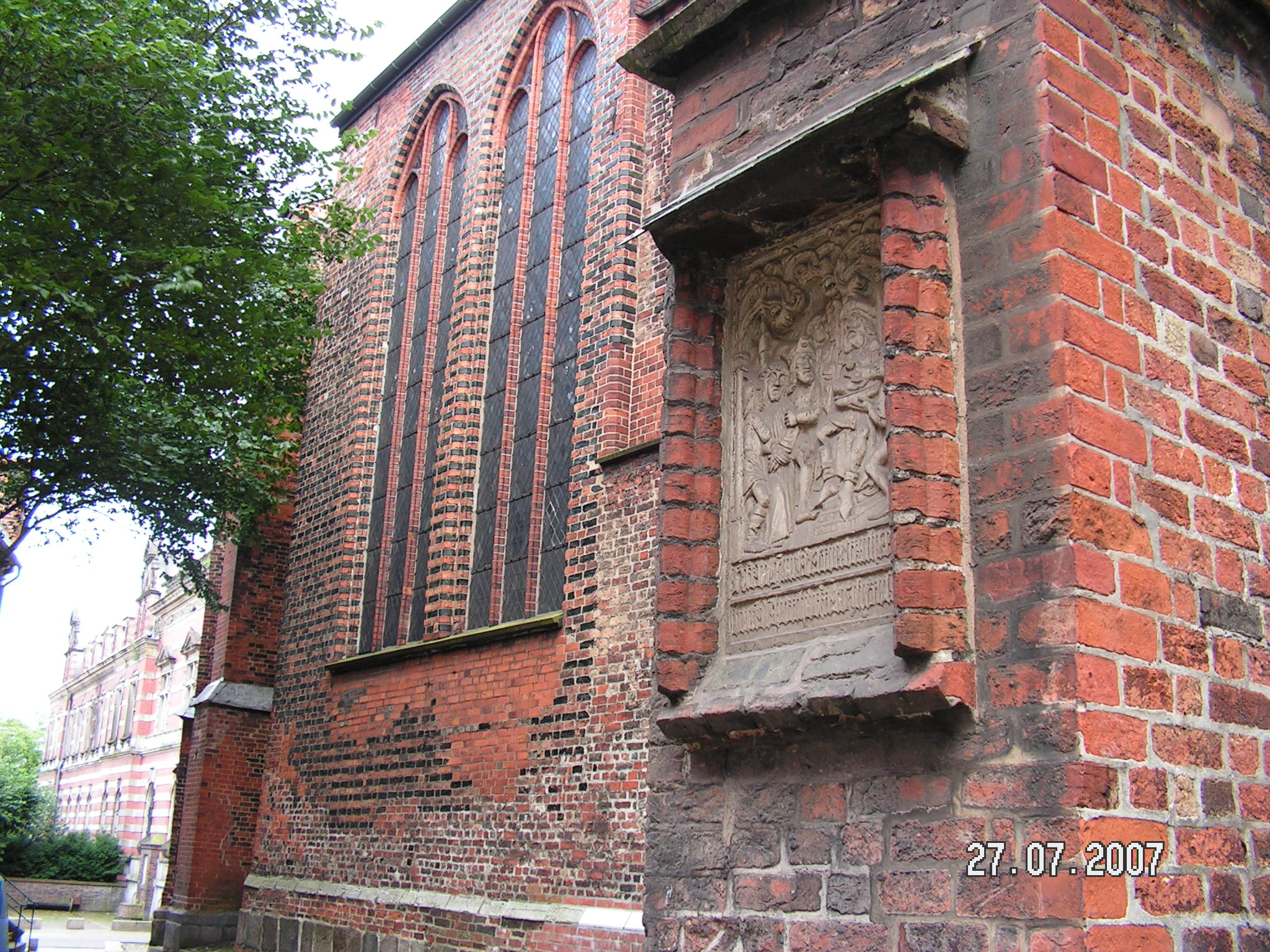 Lübeck/St.Jacobi/Beginn des Kreuzweges